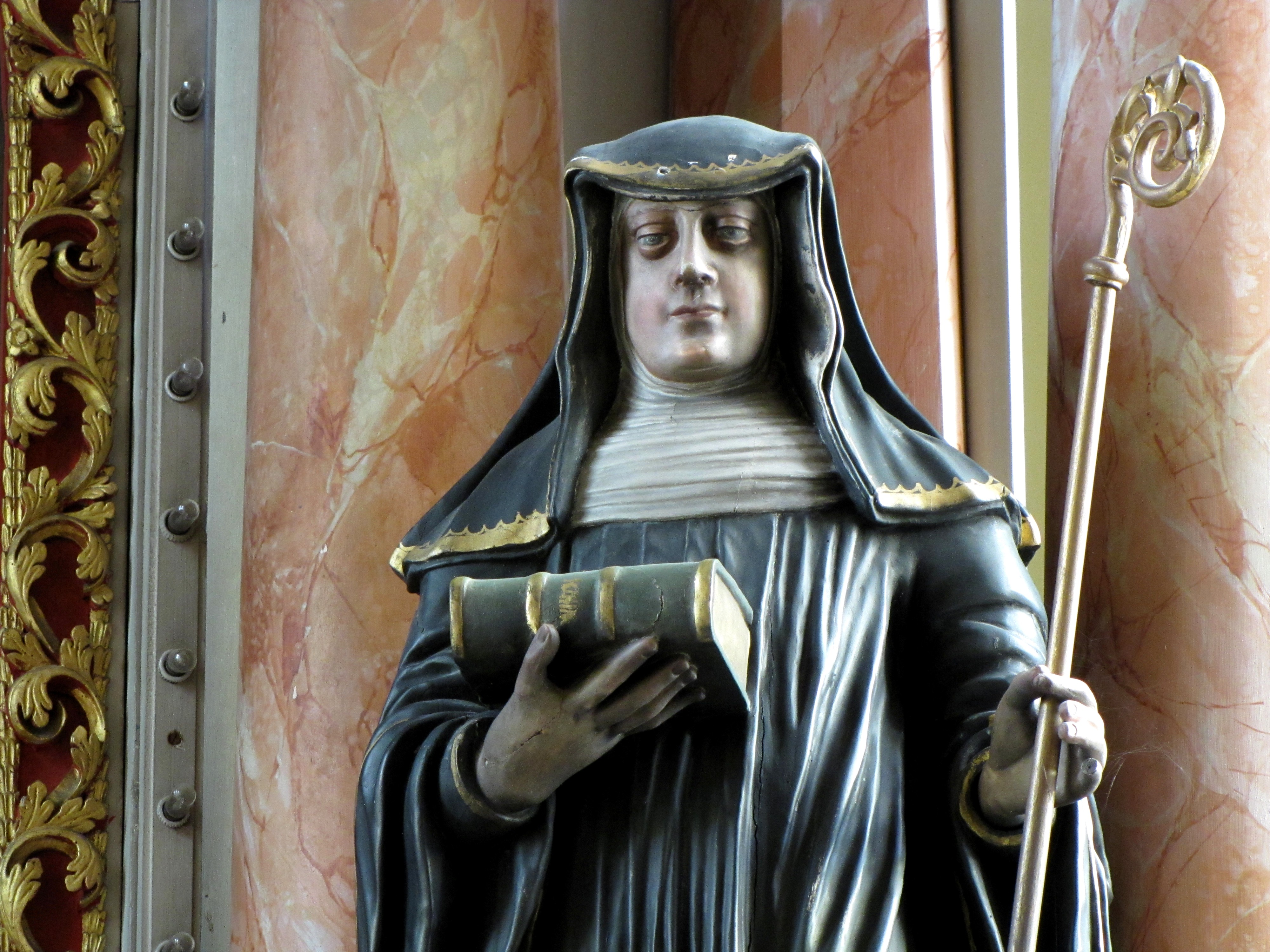 Alsace, Bas-Rhin, Église Saint-Jean-Baptiste de Biblisheim (IA67007763). Maître-autel (1724) avec statue de Ste-Scholastique (XVIIIe)